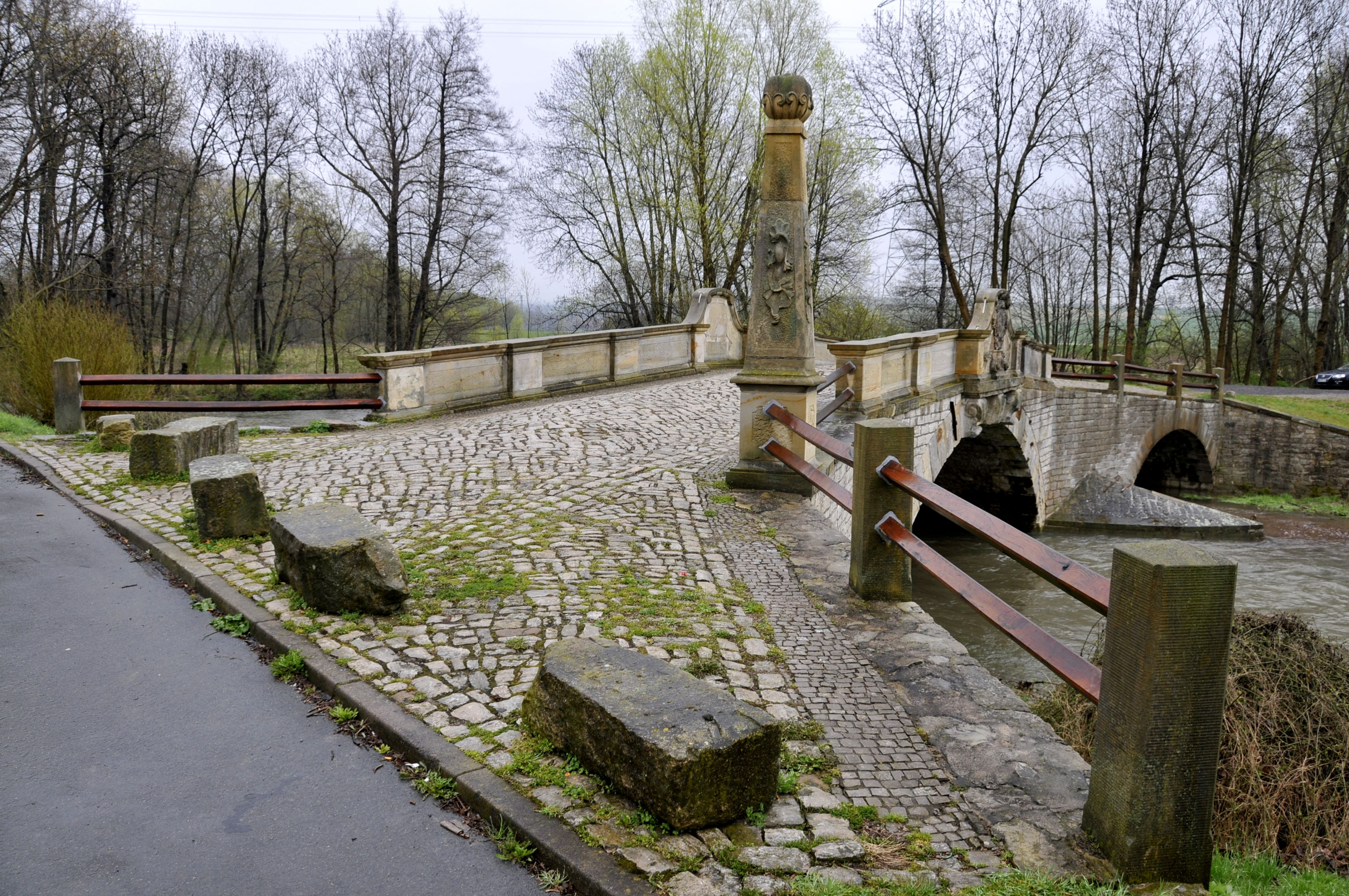 Marienthalbrücke, Zugang von Norden